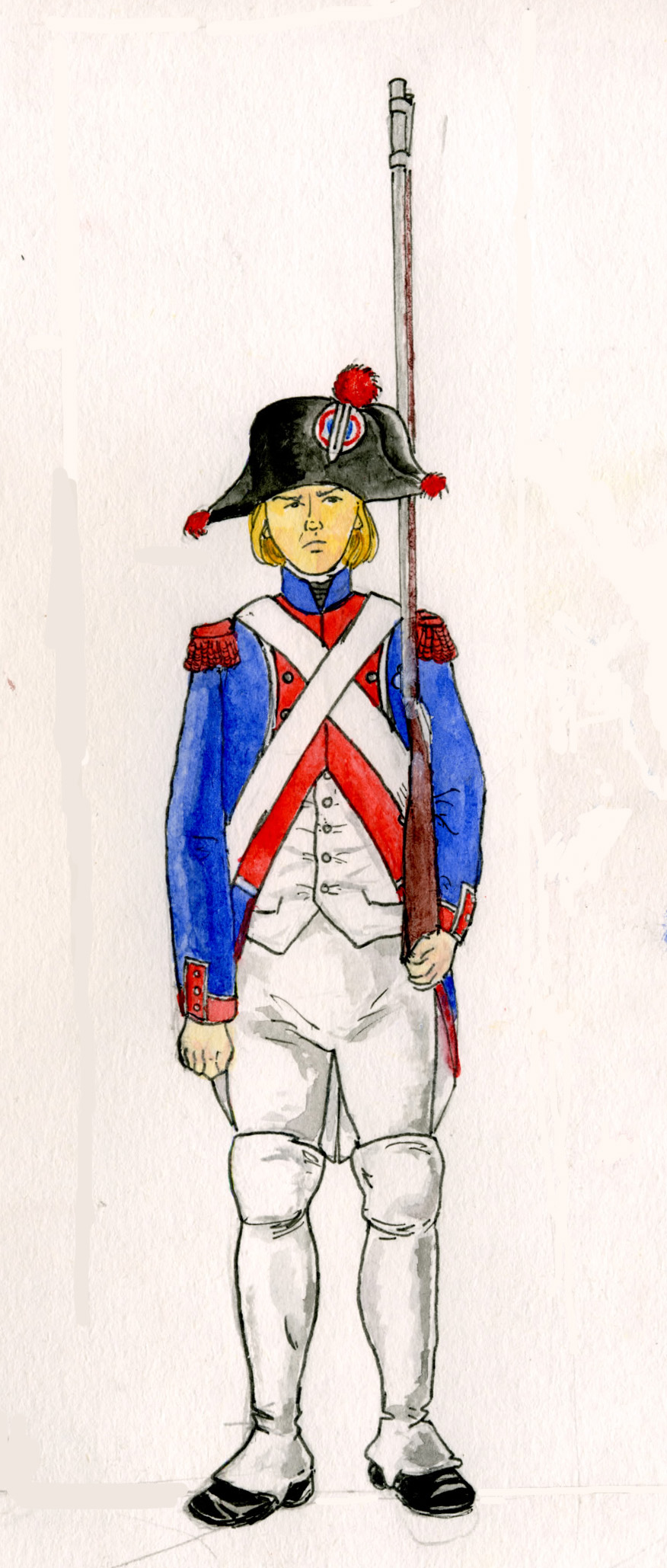 Fusilier de la convention nationale 1795